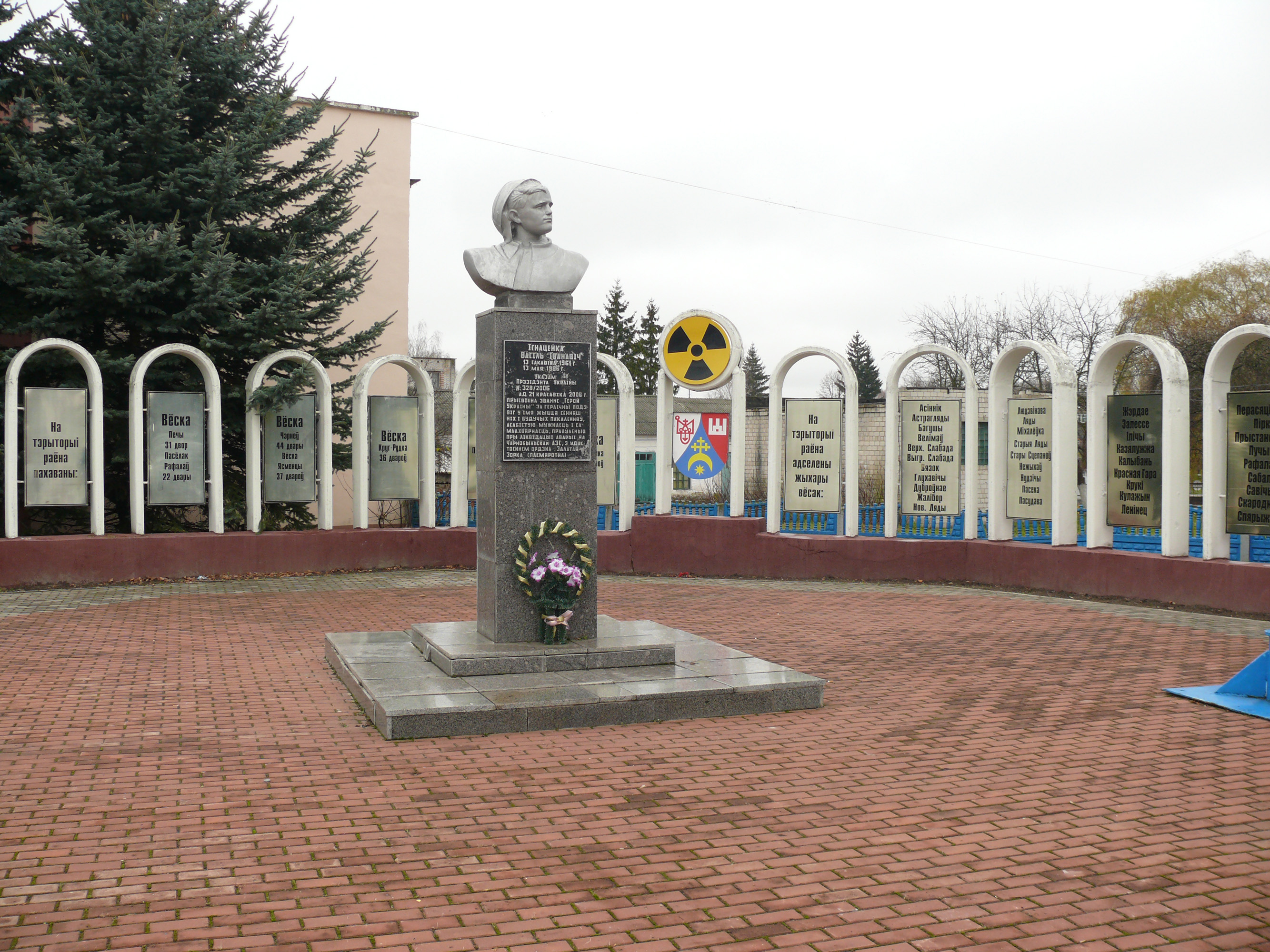 Посёлок Брагин Гомельской области Белоруссии